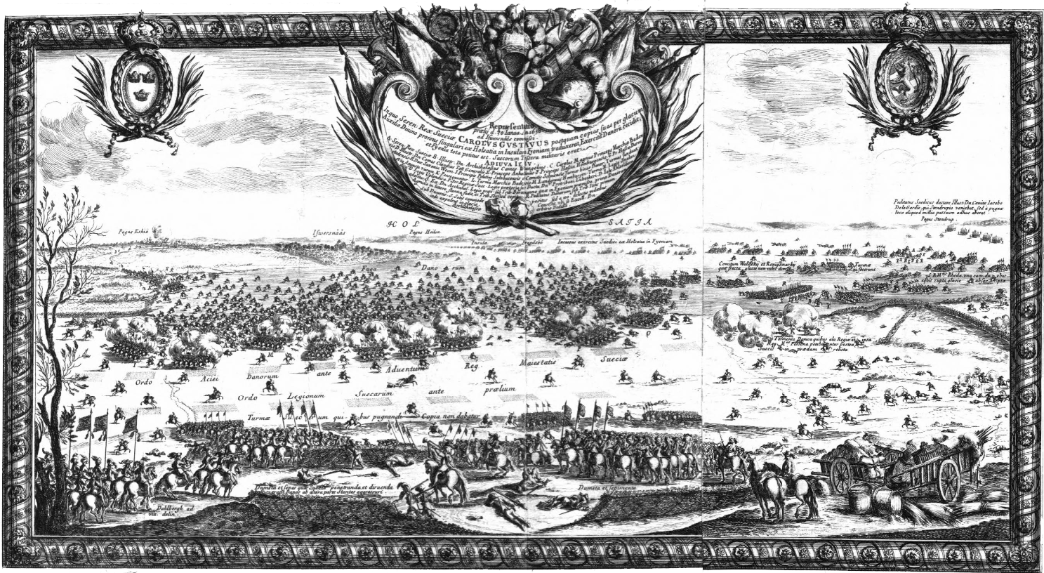 Karl Gustavs svenska armé slog den danska hären vid Ivernaes på Fyen vid Lilla Bält den 30 jan 1658 efter att ha marscherat på isen över Lilla Bält.